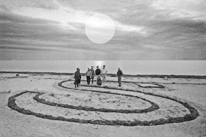 Эмблема Боспорского форума: участники I Боспорского форума на фоне последней буквы инсталляции Р. Егорова "Look to the Heavens". Фото Андрея Канищева.